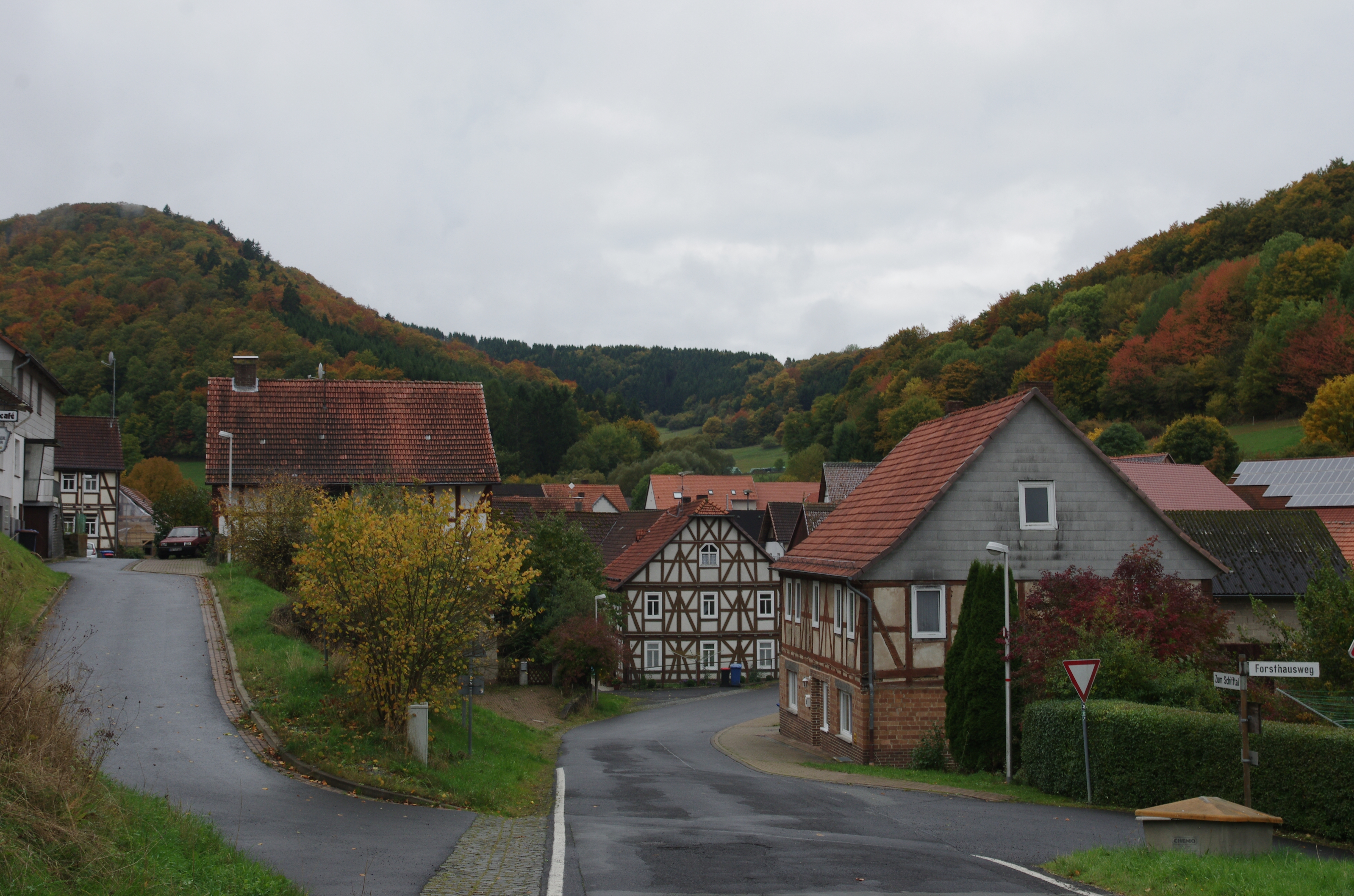 Bad Wildungen Ortsteil Hüddingen in Hessen. Der Blick geht von der Kirche in den Ort.